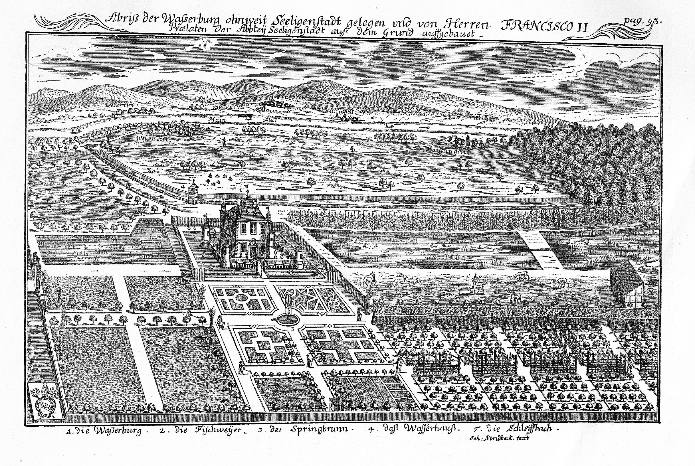 Ansicht der Wasserburg Seligenstadt und des Lustgartens von Westen. Stich auf Papier, publiziert in Georg Schaefer: Kunstdenkmäler im Großherzogthum Hessen. A. Provinz Starkenburg. Kreis Offenbach. Darmstadt 1885, S. 210.